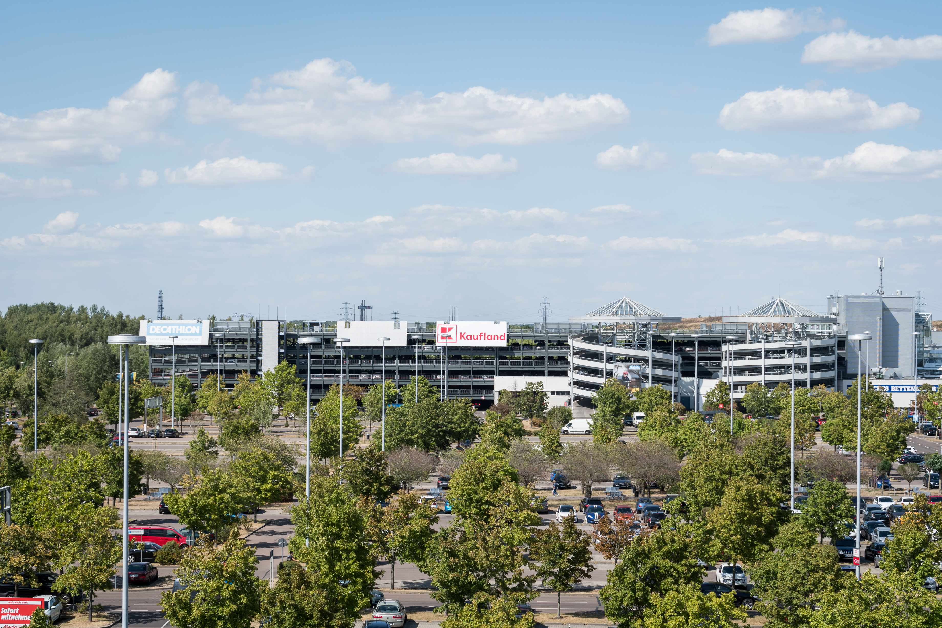 Eines der zwei Parkhäuser des Paunsdorf Centers